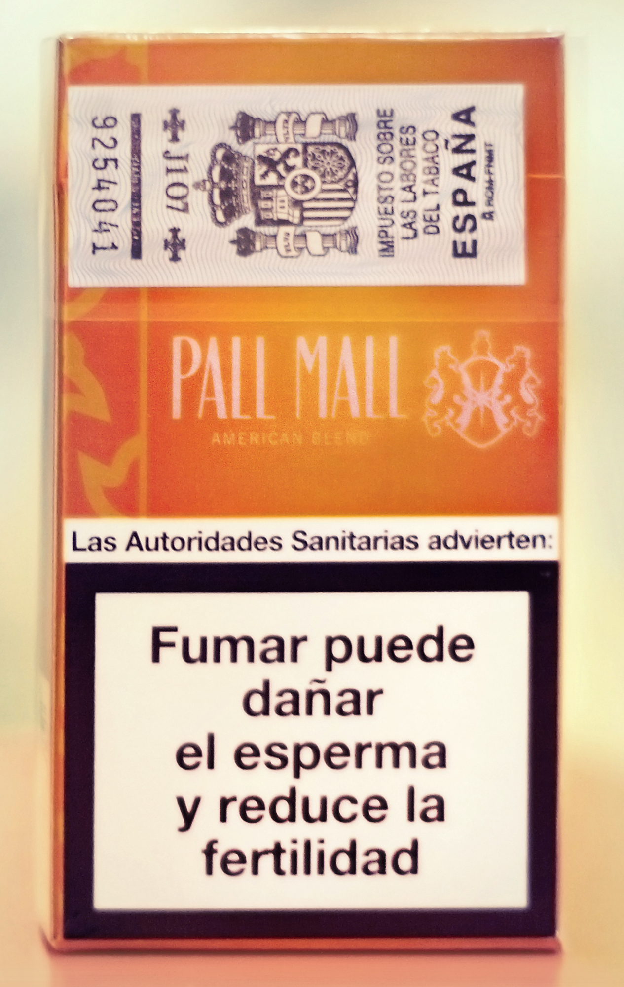 Zaragoza, España